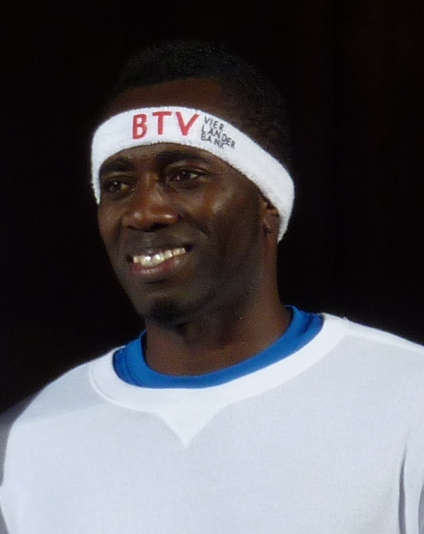 James Beckford 2012 in München beim Jump & Fly